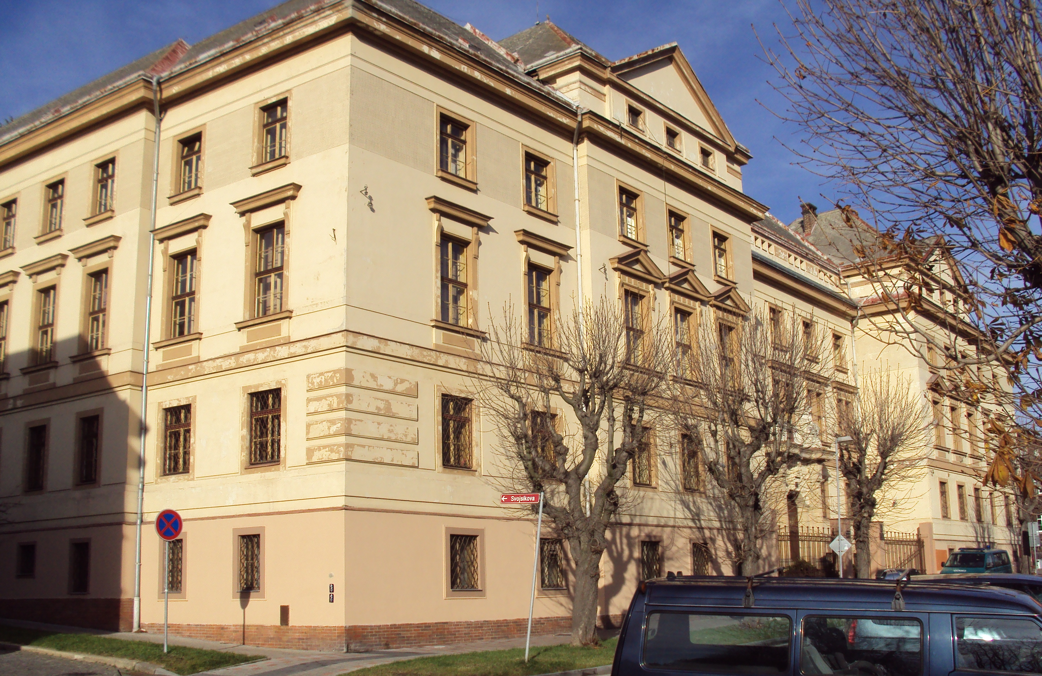 Budova Okresního soudu v Teplicích je na nároží ulic U soudu a Svojsíkova, nedaleko fotbalového stadionu FK Teplice.